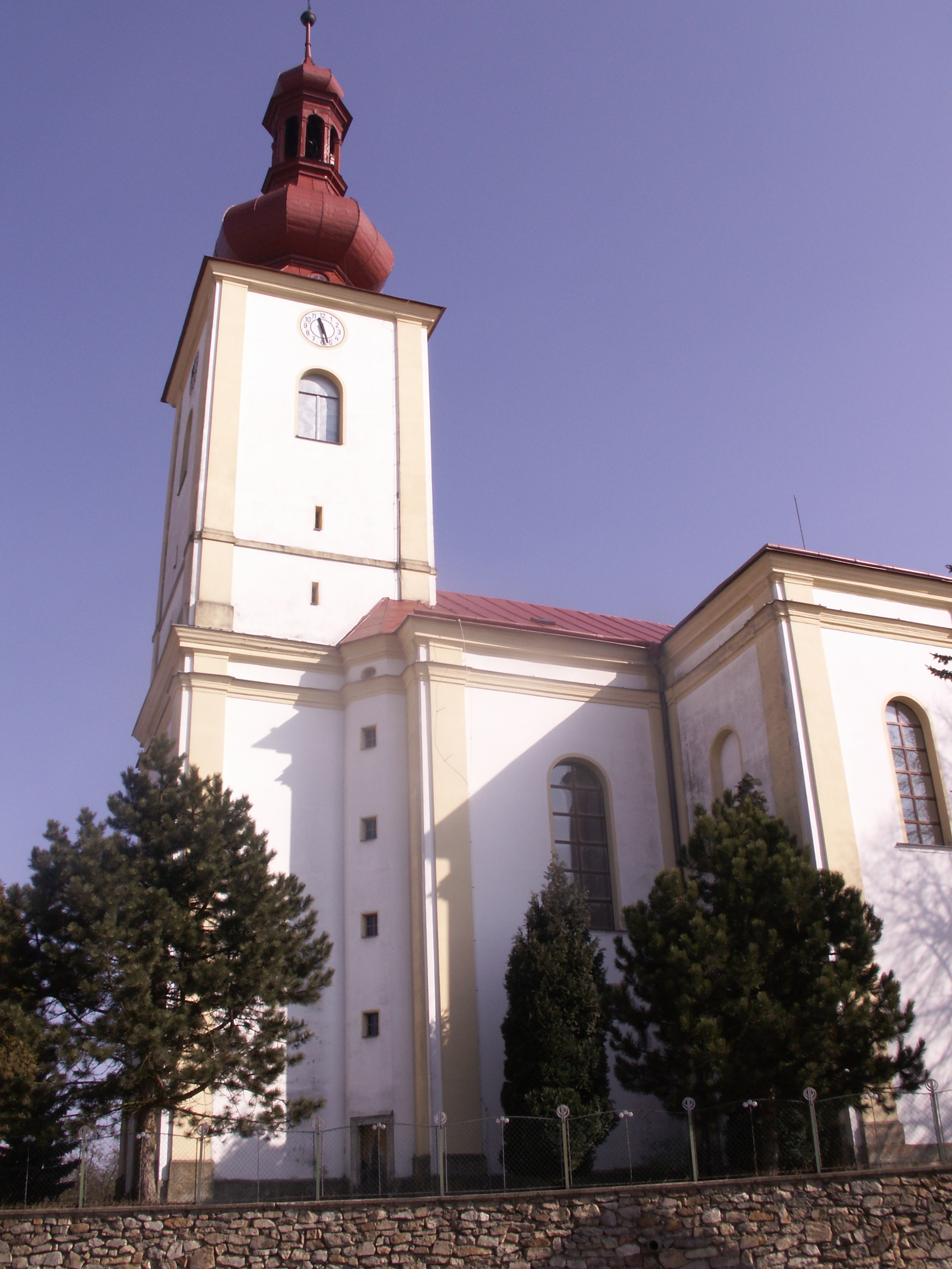 farní kostel sv. Vavřince v Bohdalově, okr. Žďár nad Sázavou, kraj Vysočina